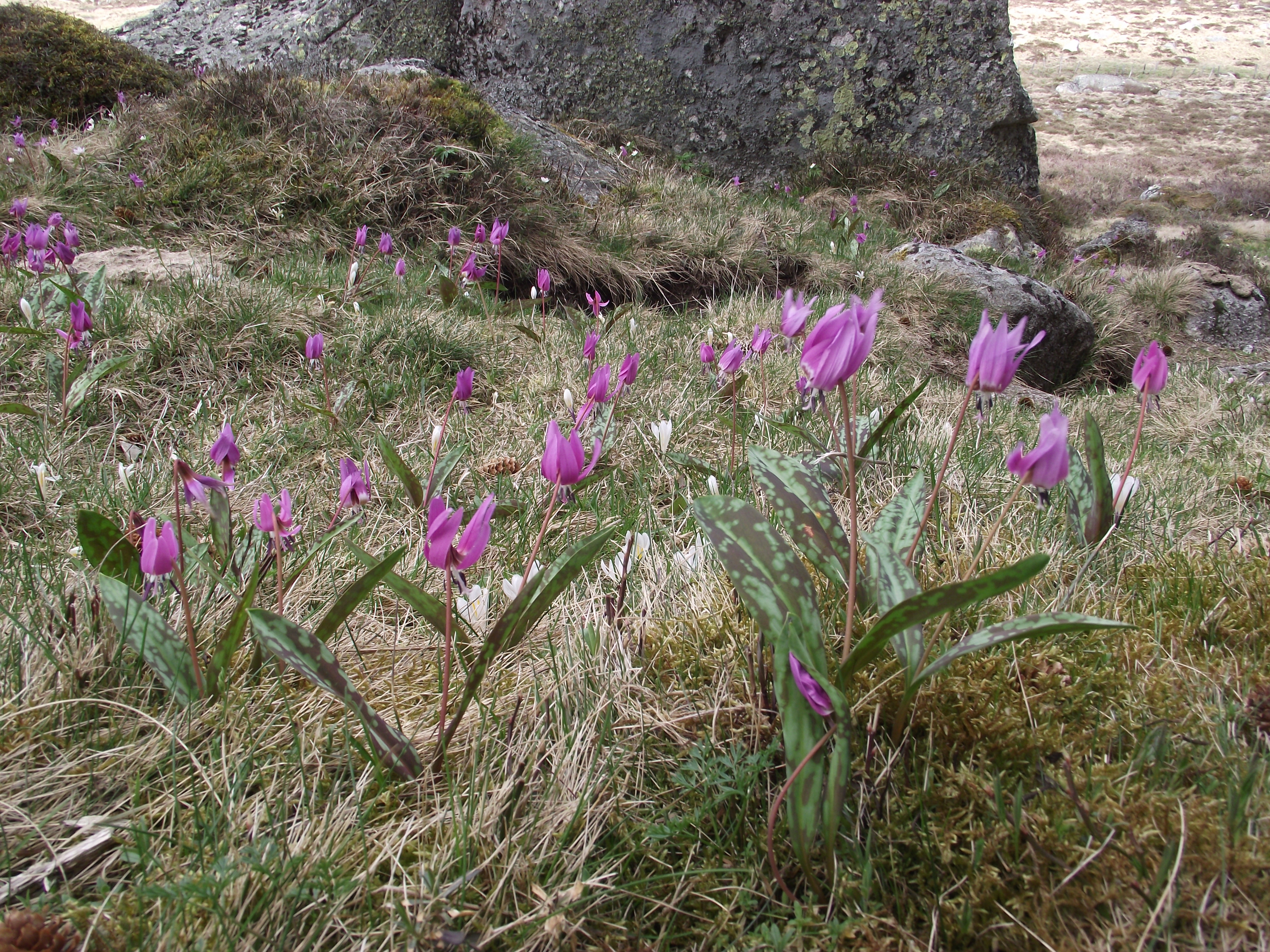 Erythronium dens-canis sur le plateau de l'Aubrac (Massif central, France). Altitude de la station : 1 230 m.